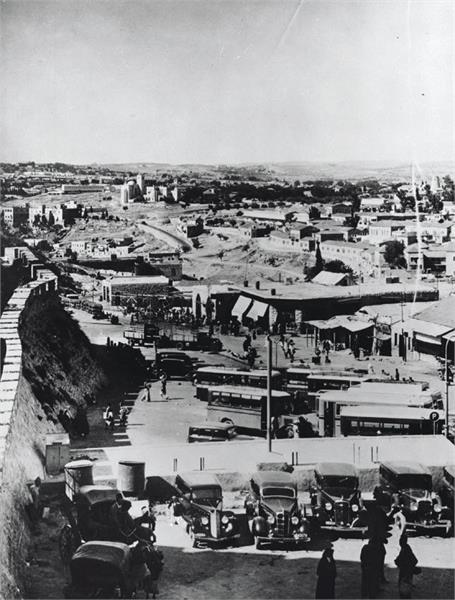 ירושלים - חנייה ליד שער יפו.